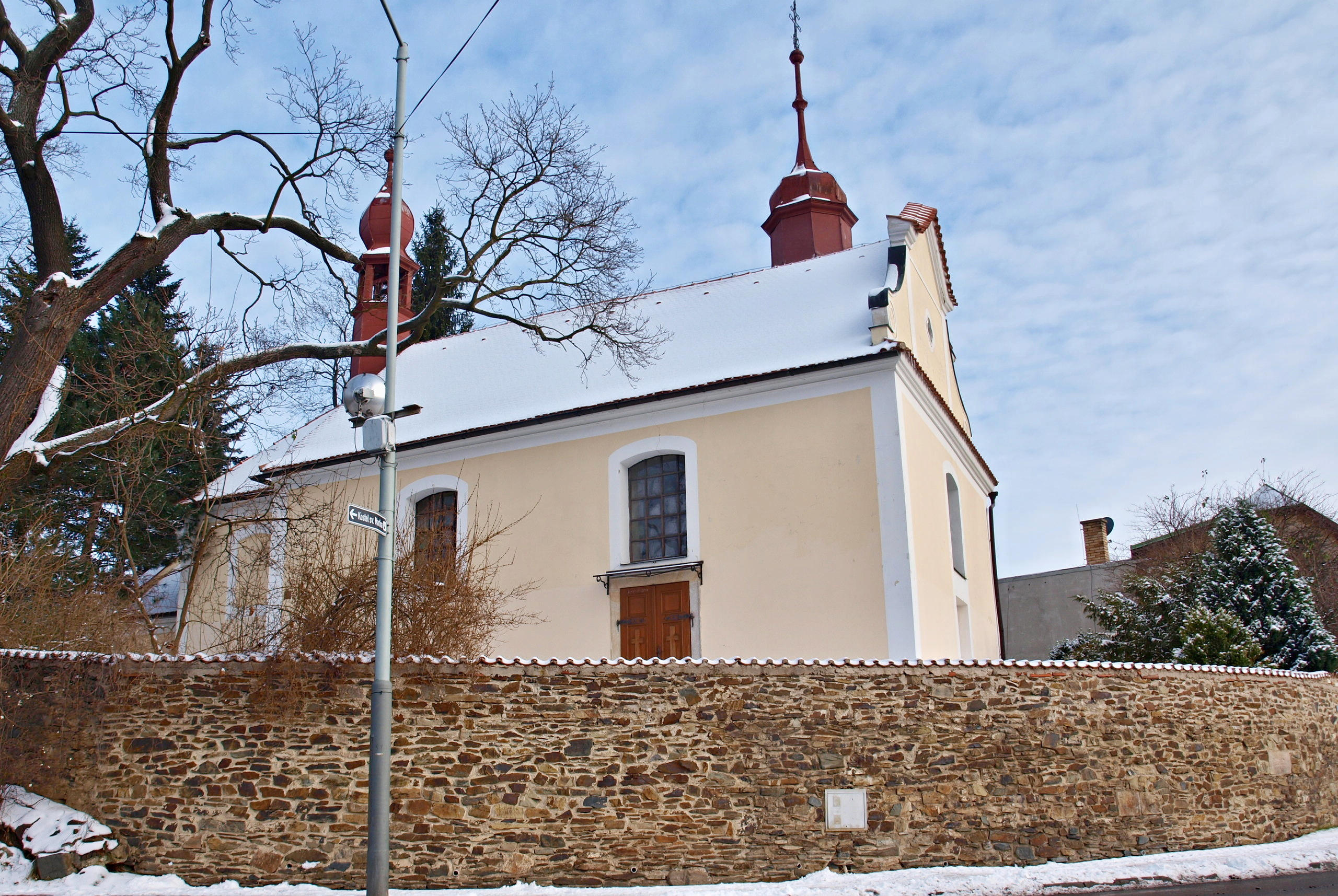 Kostel sv. Ondřeje v Kolovratech